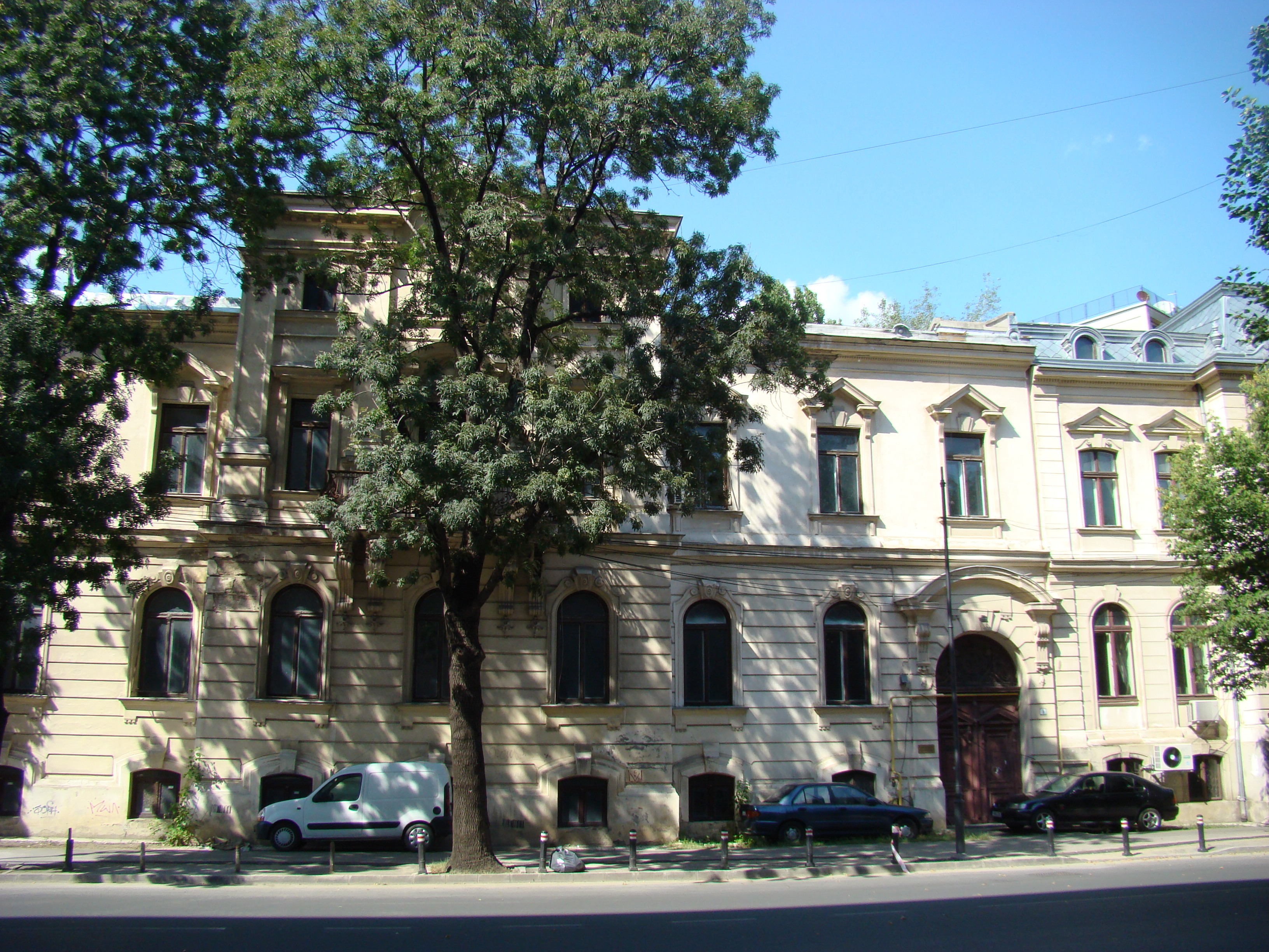 Casă monument istoric, str. Dobrescu Demetru, nr.7-11 (Fosta Legație austro-ungară)